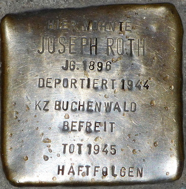 Vor dem Hauseingang Annaberger Straße 74, dem ehemaligen Wohn- und Sterbehaus